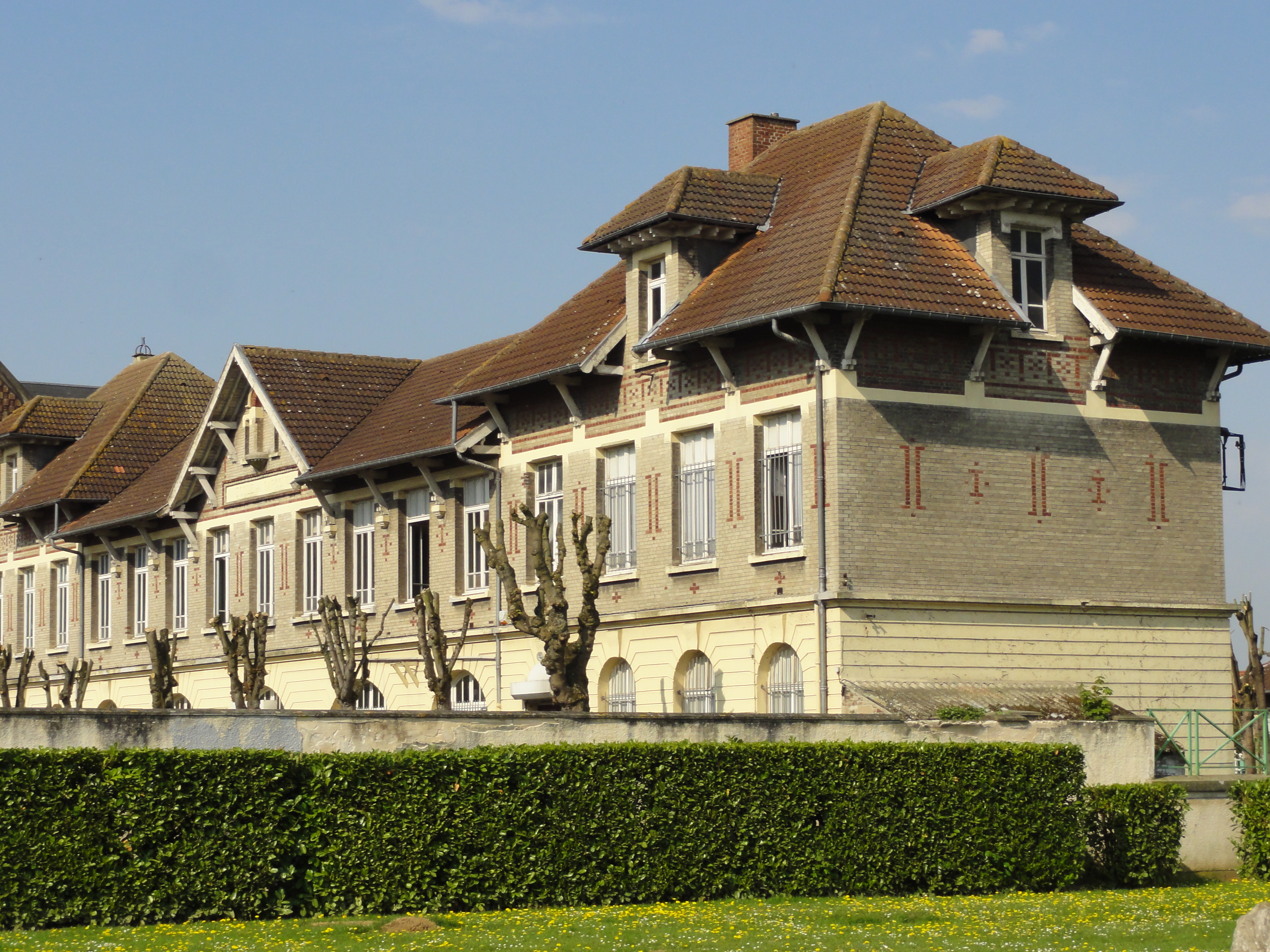 Église Saint-Amé et écoles de la Fosse n° 3 - 3 bis de la Compagnie des mines de Lens à Liévin, Pas-de-Calais, Nord-Pas-de-Calais, France.